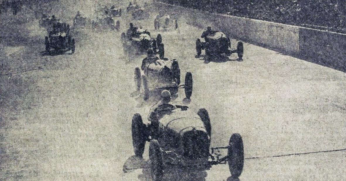 Le départ du Grand Prix de l'ACF 1931.